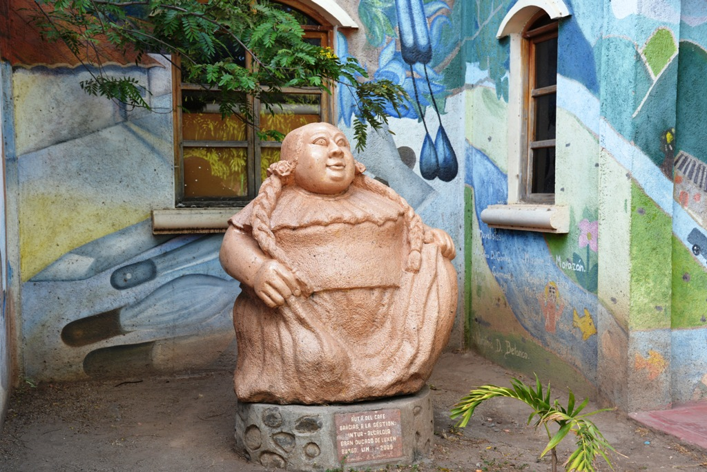 Gordita, San Juan de Limay, Nicaragua